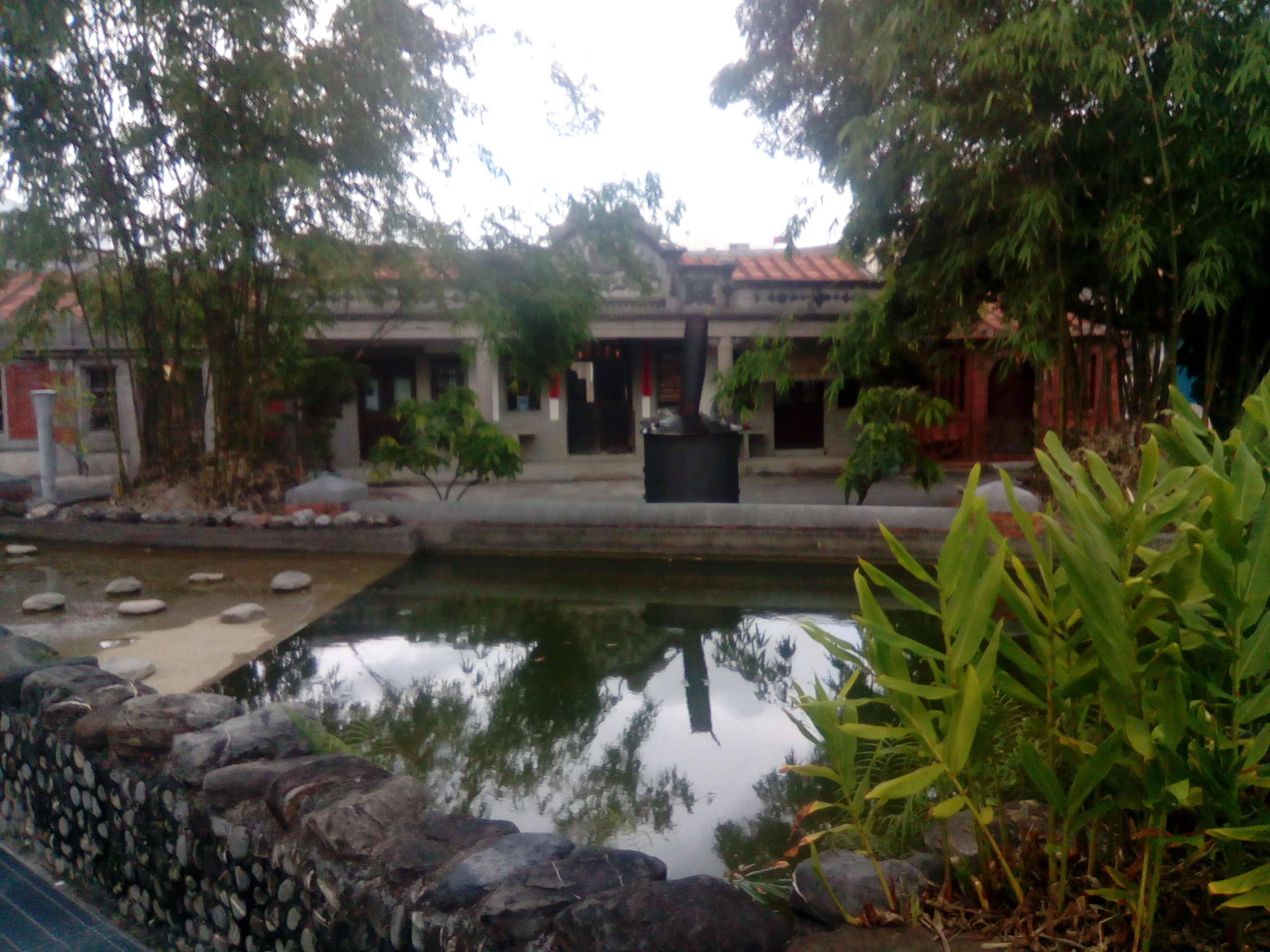 鄉內的三級古蹟